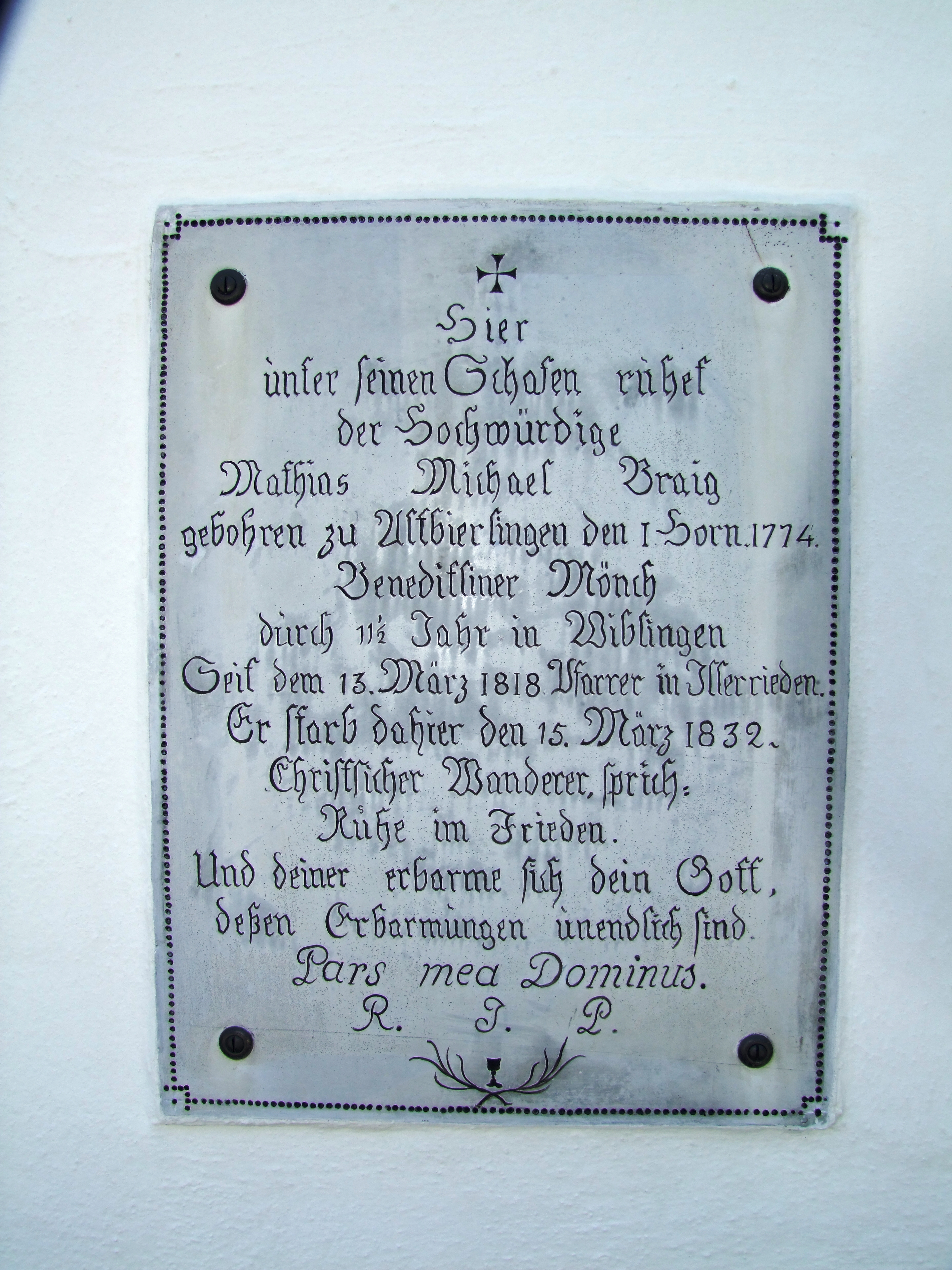 Gedenktafel von Pfarrer Mathias Michael Braig Benediktinermönch. Pfarrer in Illerrieden von 01.03.1818-15.03.1832. Geboren am 01.02.1774 in Altbierlingen. Verstorben am 15.03.1832 in Illerrieden.